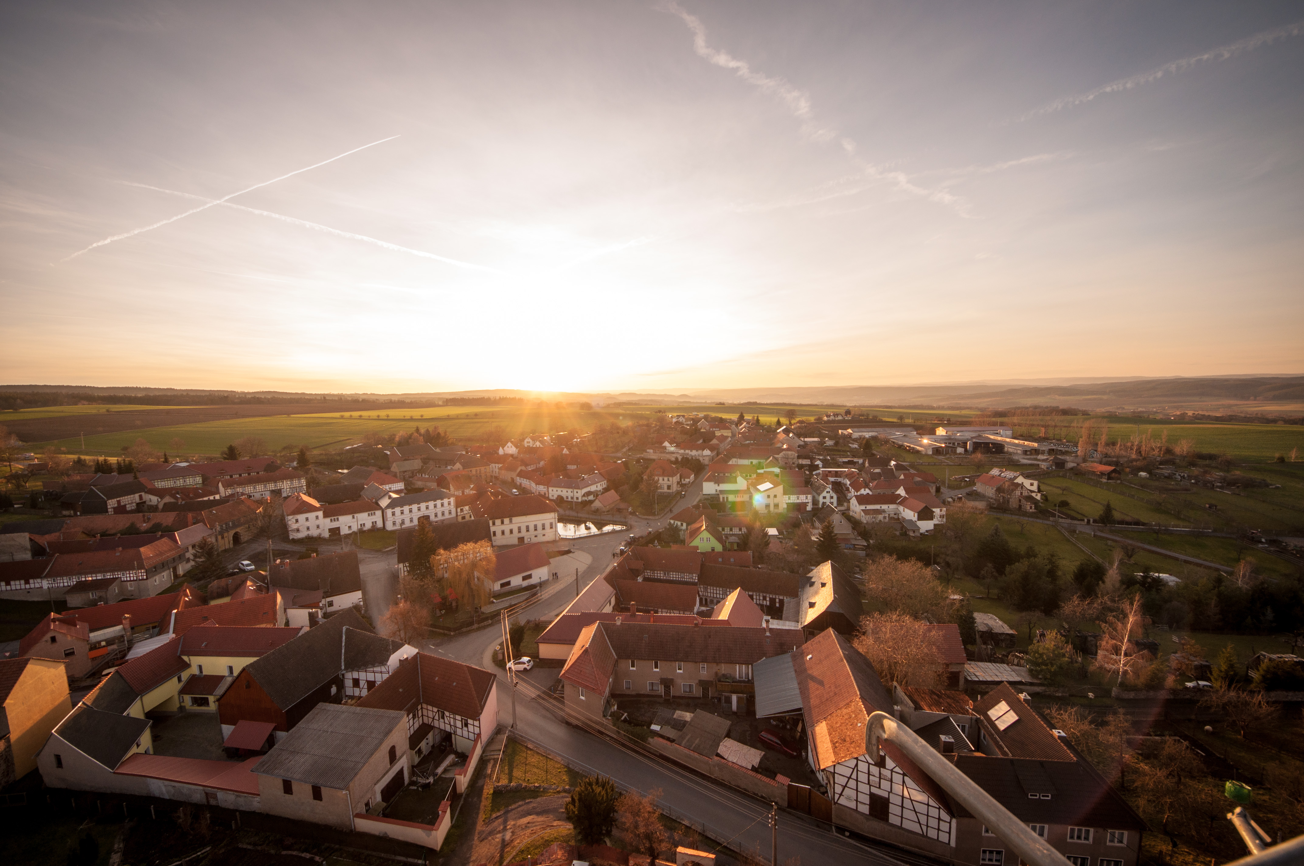 Blick in die Dorfmitte von Weira vom Weiraer Kirchturm